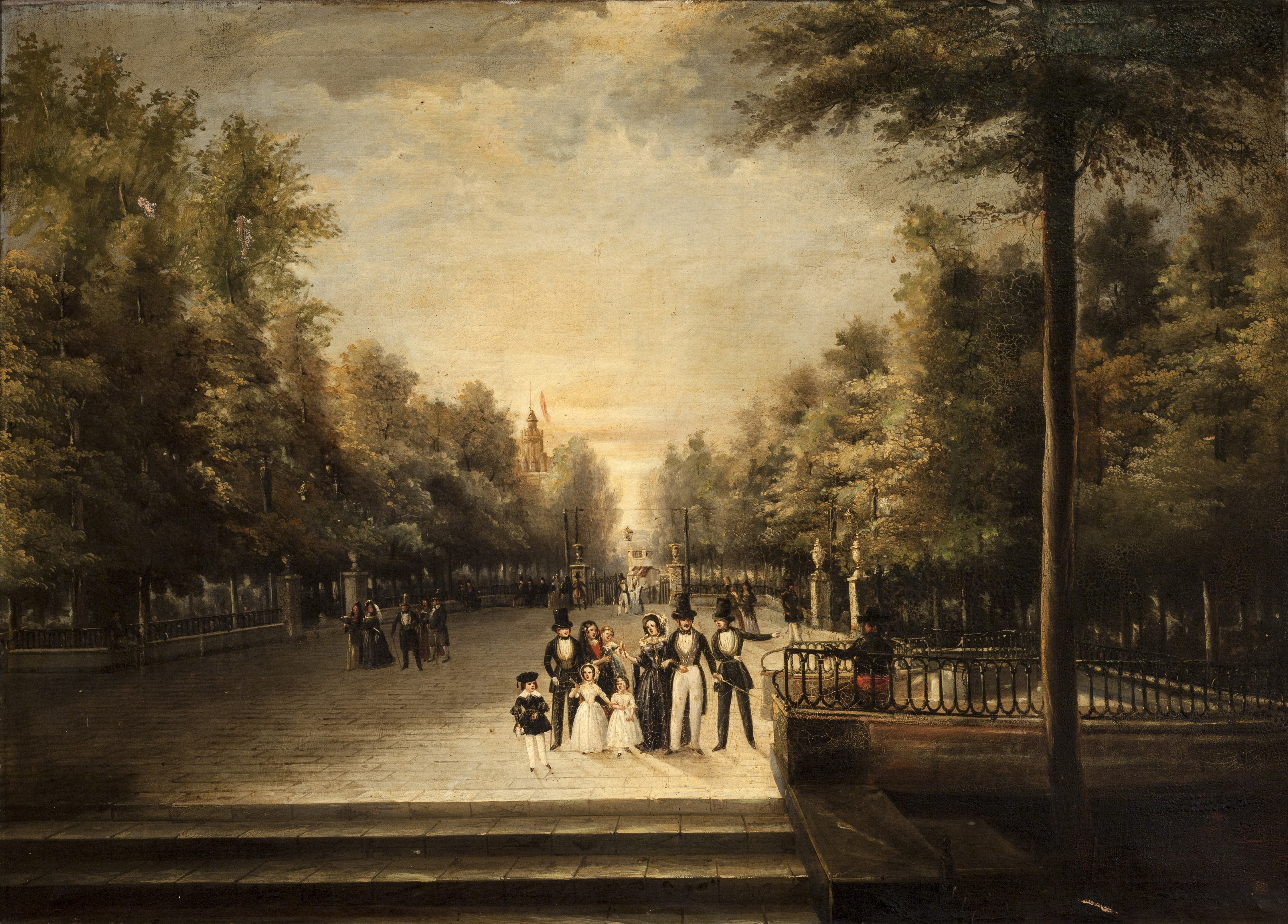 La obra representa el Paseo de Cristina de la ciudad de Sevilla, (Spain), que actualmente es conoido como los Jardines de Cristina, y es una copia basada en un cuadro del pintor Francisco Ramos. El Paseo de Cristina fue inaugurado en 1830 por José Manuel de Arjona, que en esos momentos era el asistente de la ciudad hispalense.